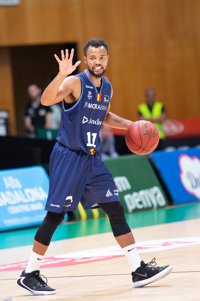 Clevin Hannah en un partido de la Liga Catalana 2019 en el Olímpico de Badalona.